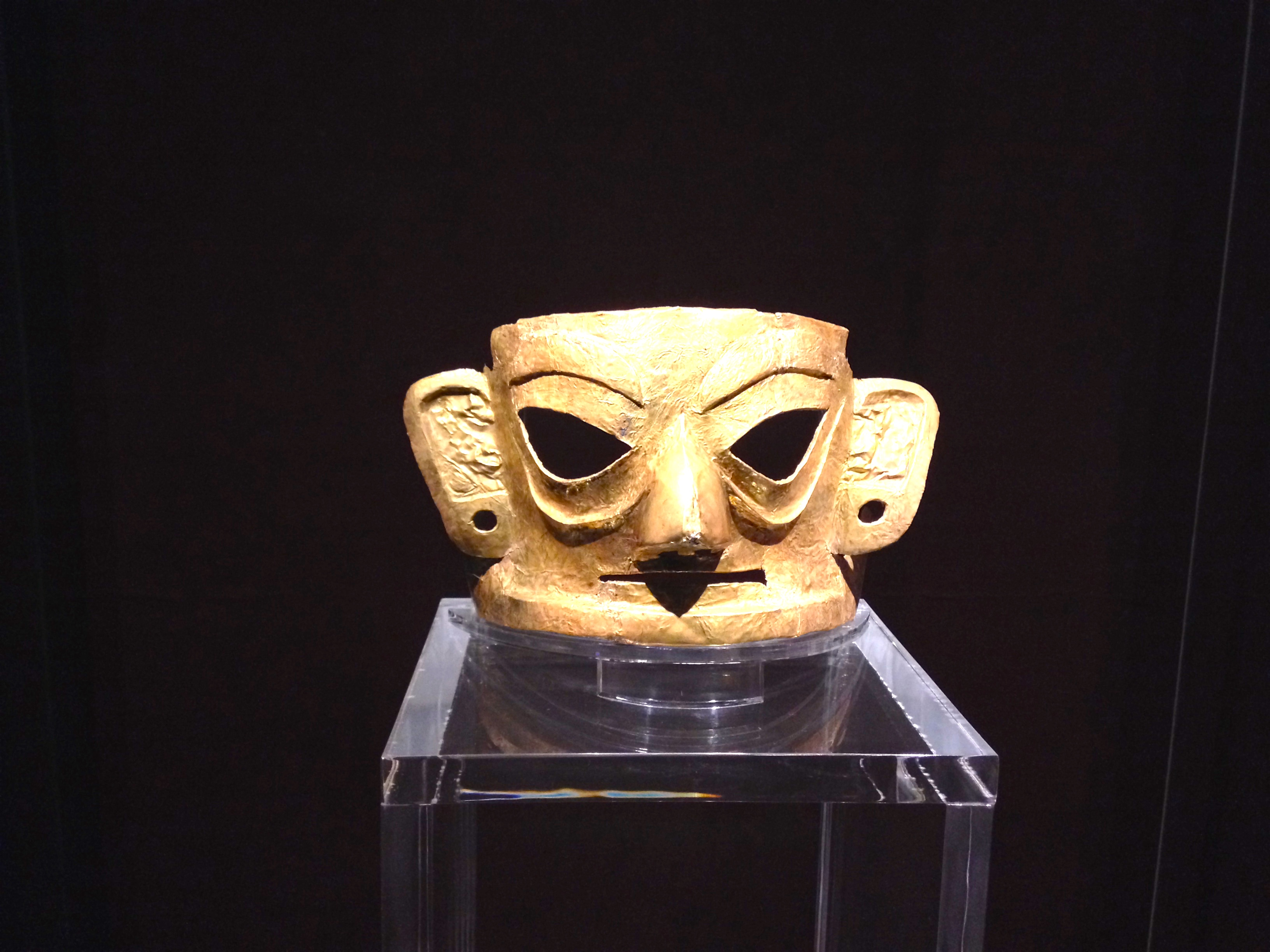 Jinniu, Chengdu, Sichuan, China